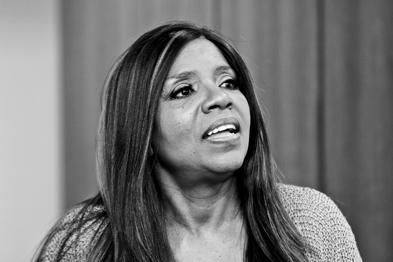 Duisburger Sparkassen-Gala mit Gloria Gaynor